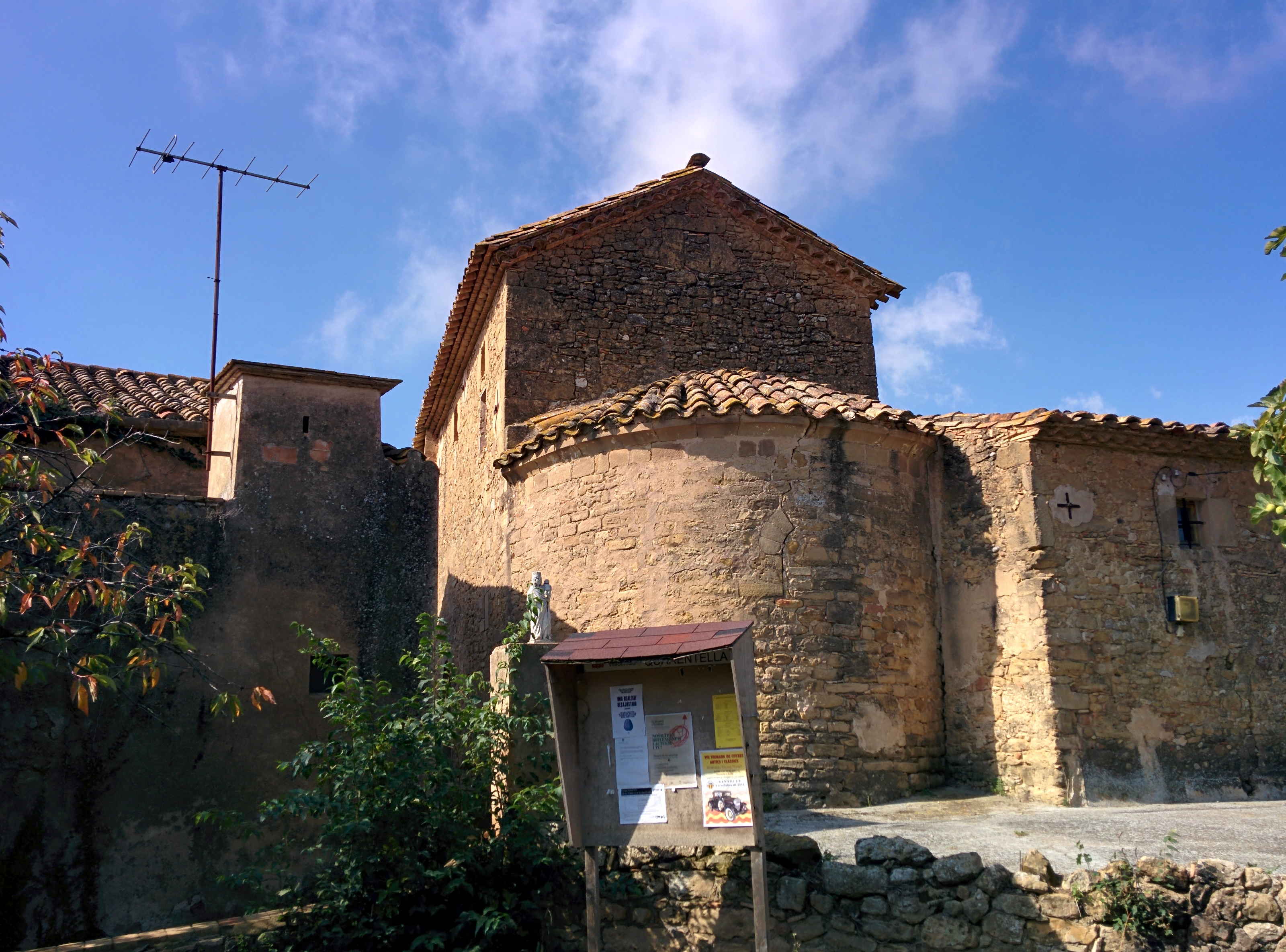 Església parroquial de Sant Marçal de la Quarantella (Vilademuls)